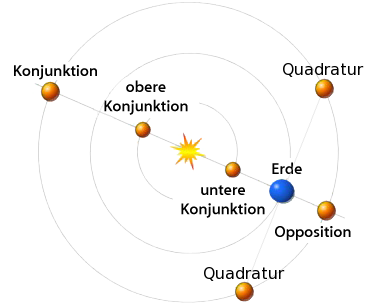 Quadratur-Konstellation Based on File:Konjunktion.png